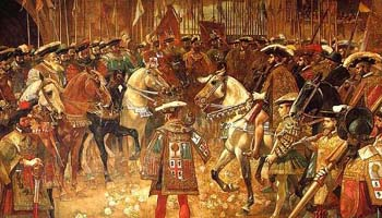 Paz de las Germanías, óleo sobre lienzo del pintor aragonés Marcelino Unceta y López (1836–1905)